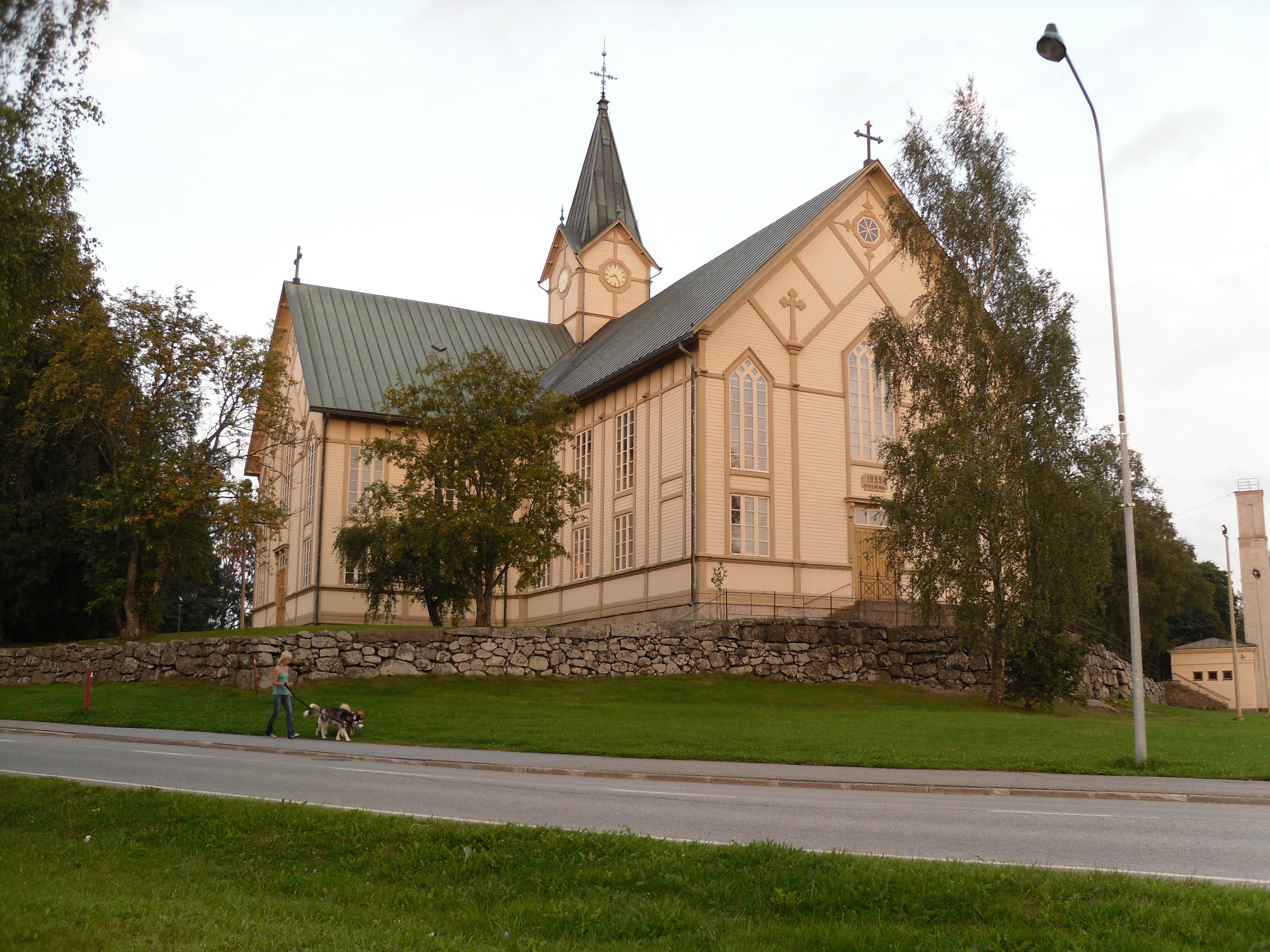 Merikarvian kirkko